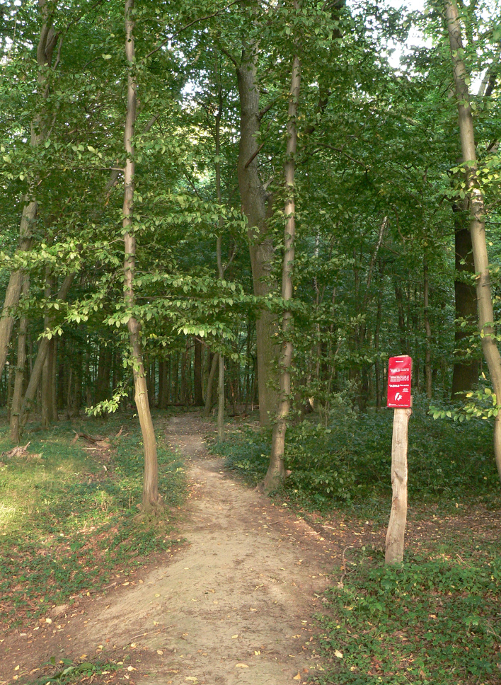 Bockmerholz